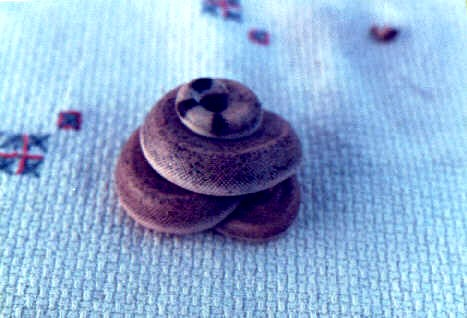 Eryx johnii